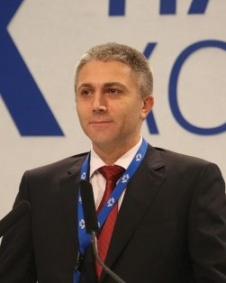 Мустафа карадайы ДПС